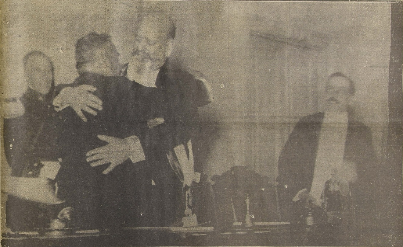 S.E el Presidente de la República, momentos después de prestar juramento, da un efusivo al presidente del Senado, don Enrique Oyarzún.